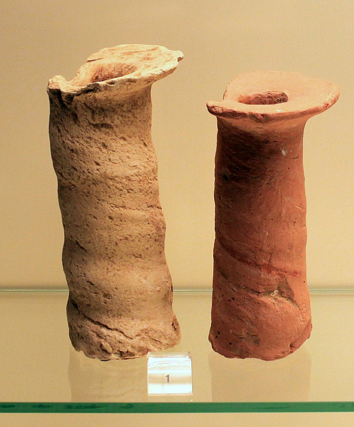 Camino de la Vega de Albalate (Calanda, Teruel): Clavijas.